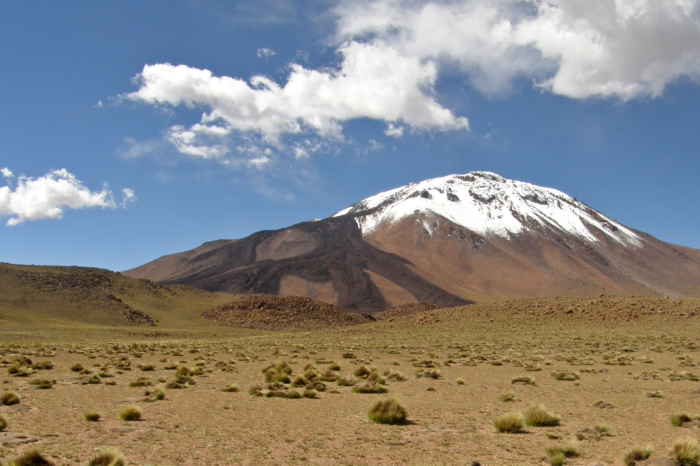 Vue des coulés de lave sur le flan sud ouest du volcan Tuzgle, départamento de Susques, Provincia de Jujuy, Argentina